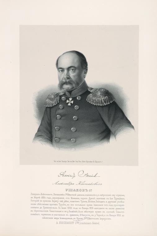 генерал А. К. Ушаков